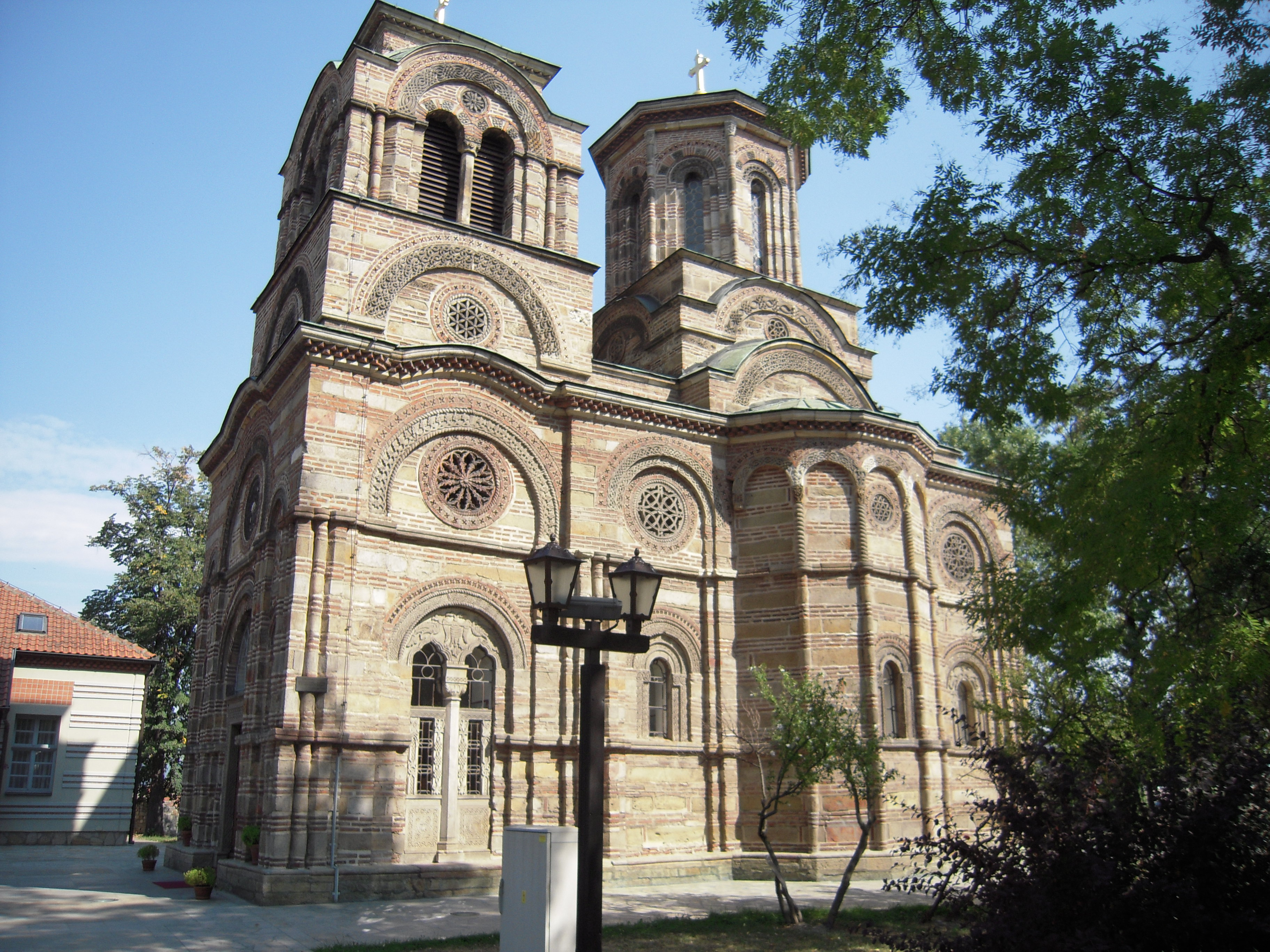 Црква Лазарица